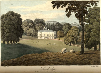 Lindridge House, Bishopsteignton, Devon